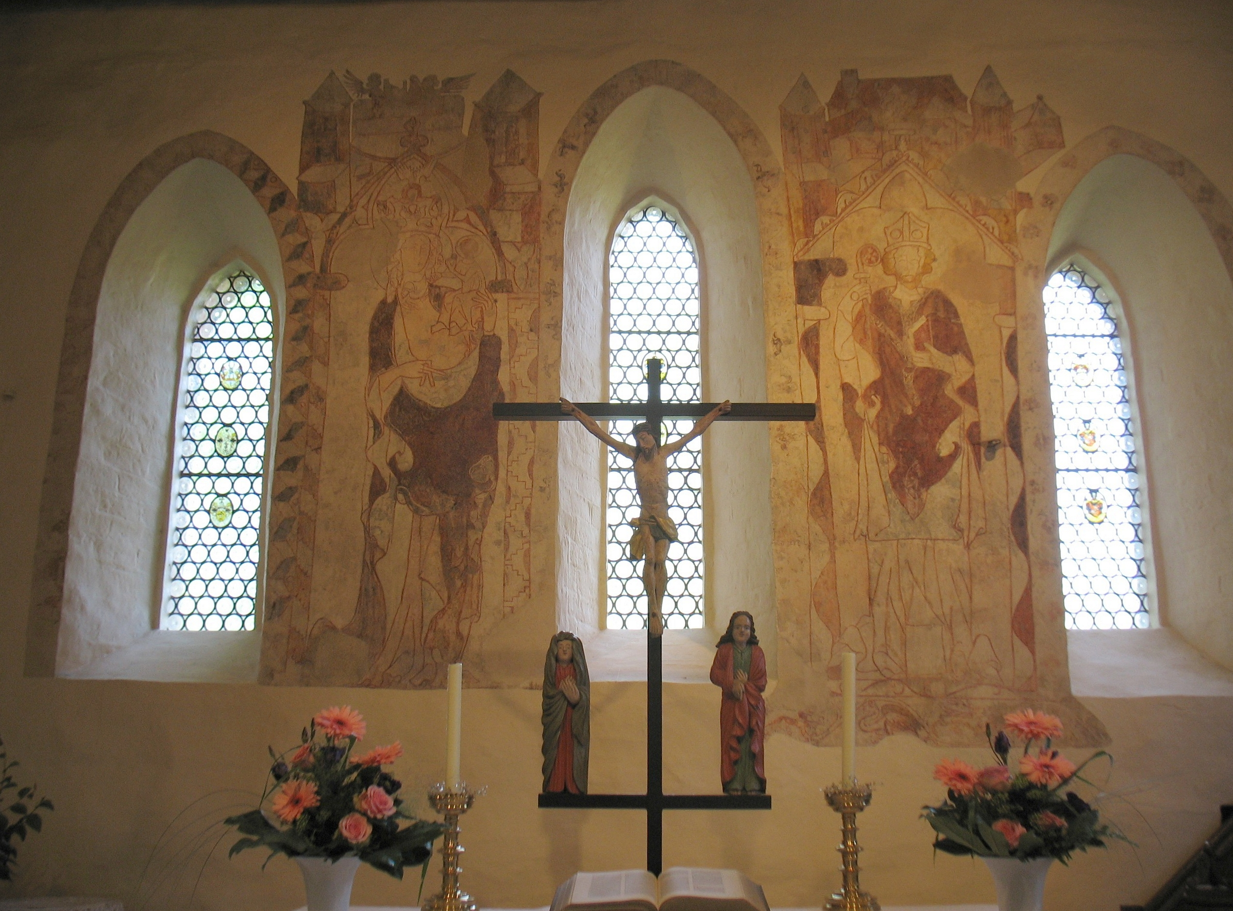 Sprakensehl, ev. Kirche, Altarwand mit gotischen Wandmalereien (Maria mit dem Kind; hl. Bischof Godehard (?)); Kreuzigungsgruppe